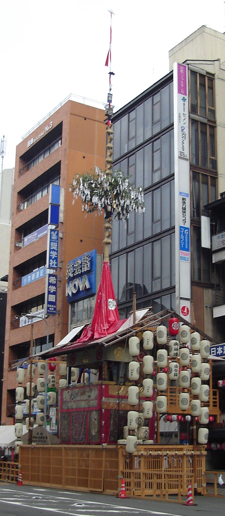 KanokoBoko(函谷鉾), Kyoto,Japan